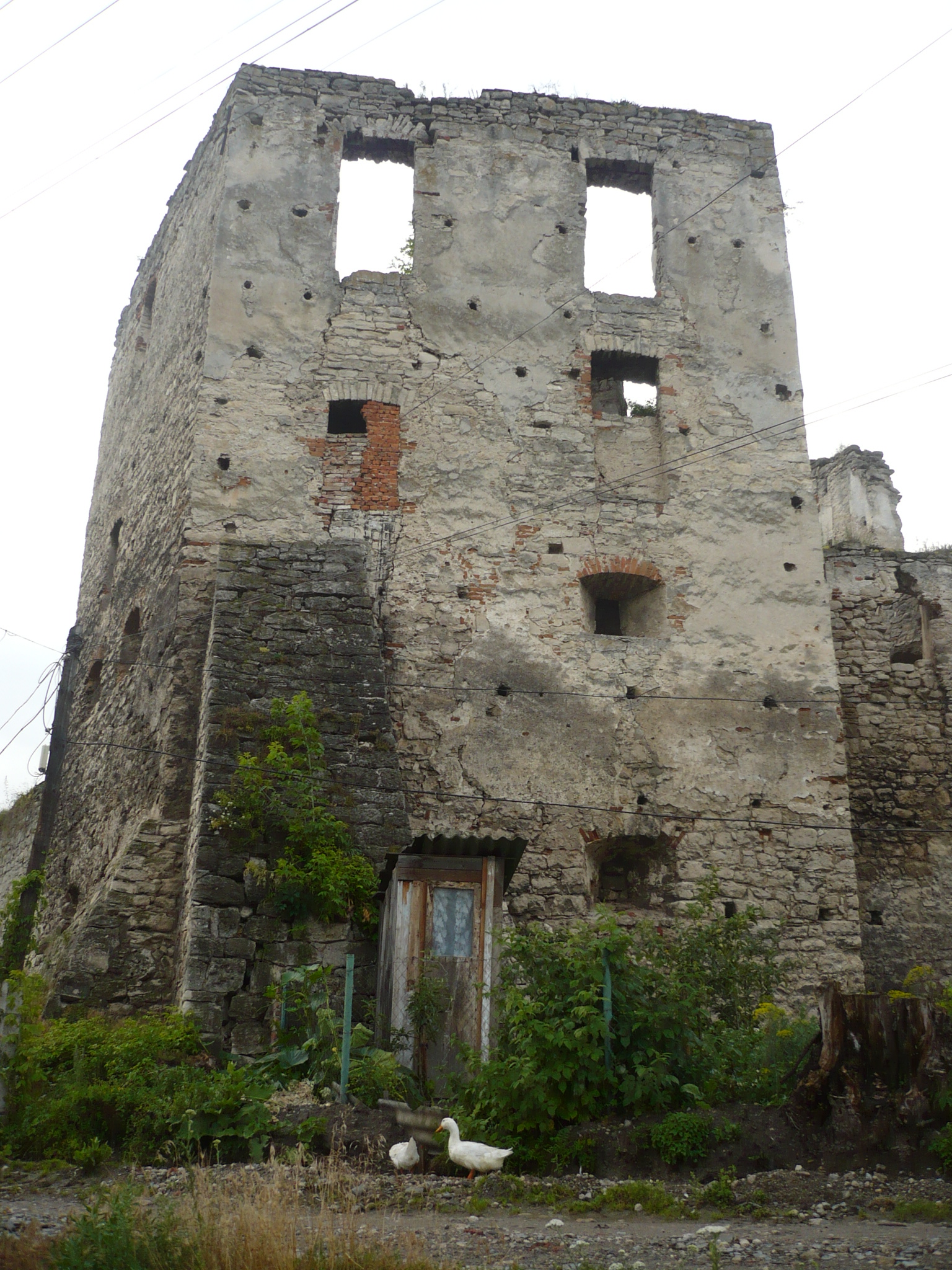 Czortków. Zamek